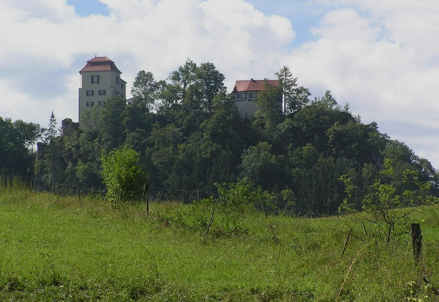 Blick auf die Burg Bronnen